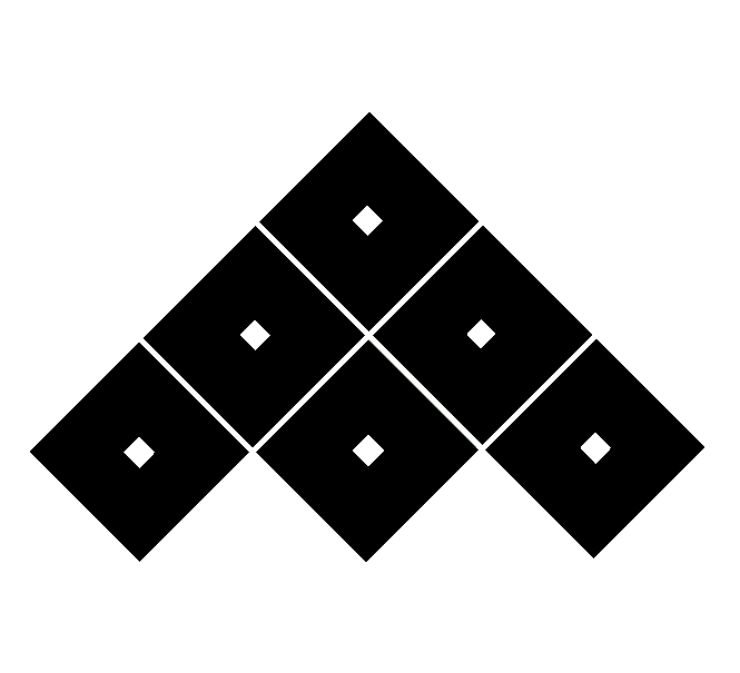 家紋：六つ目結紋